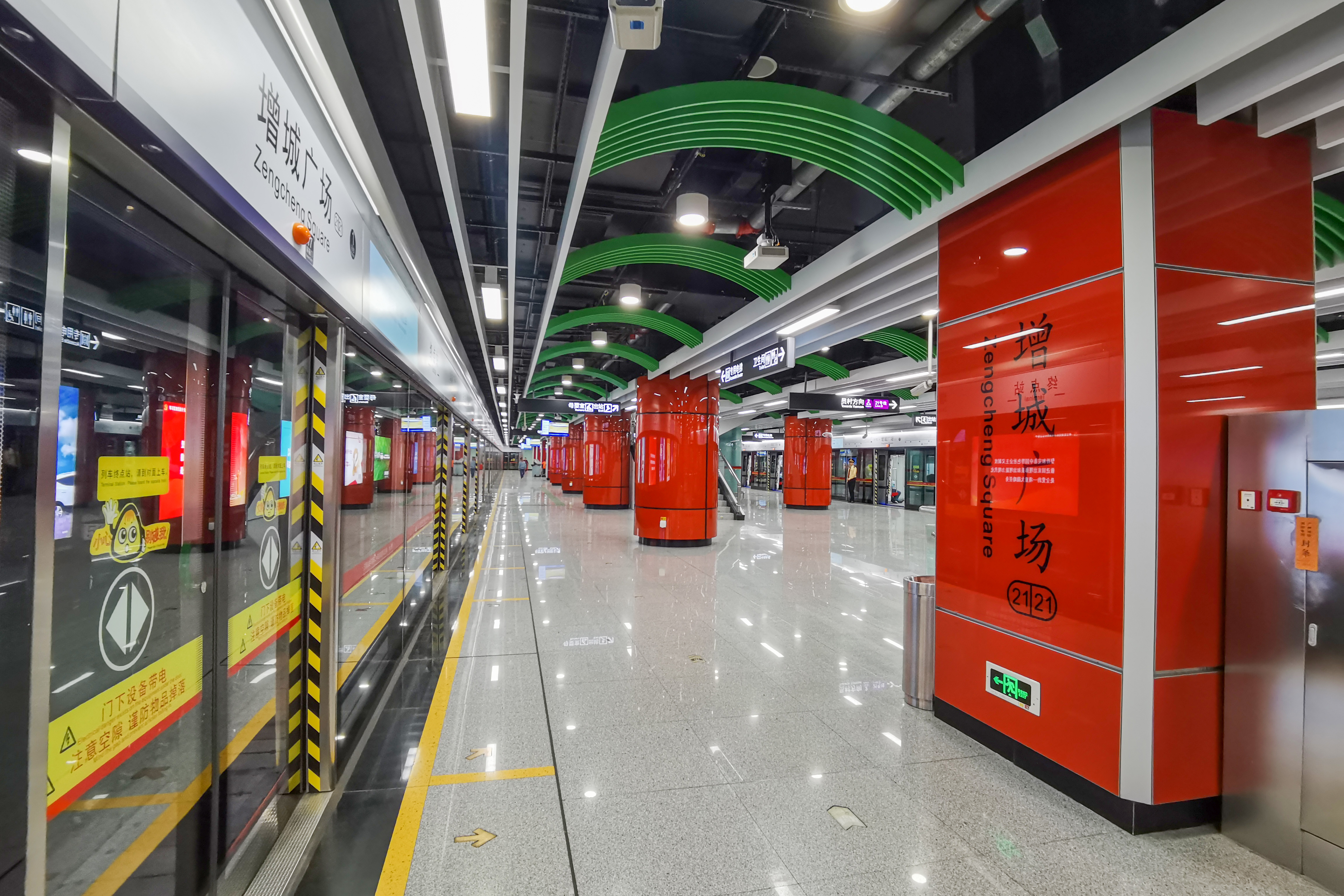 广州地铁增城广场站